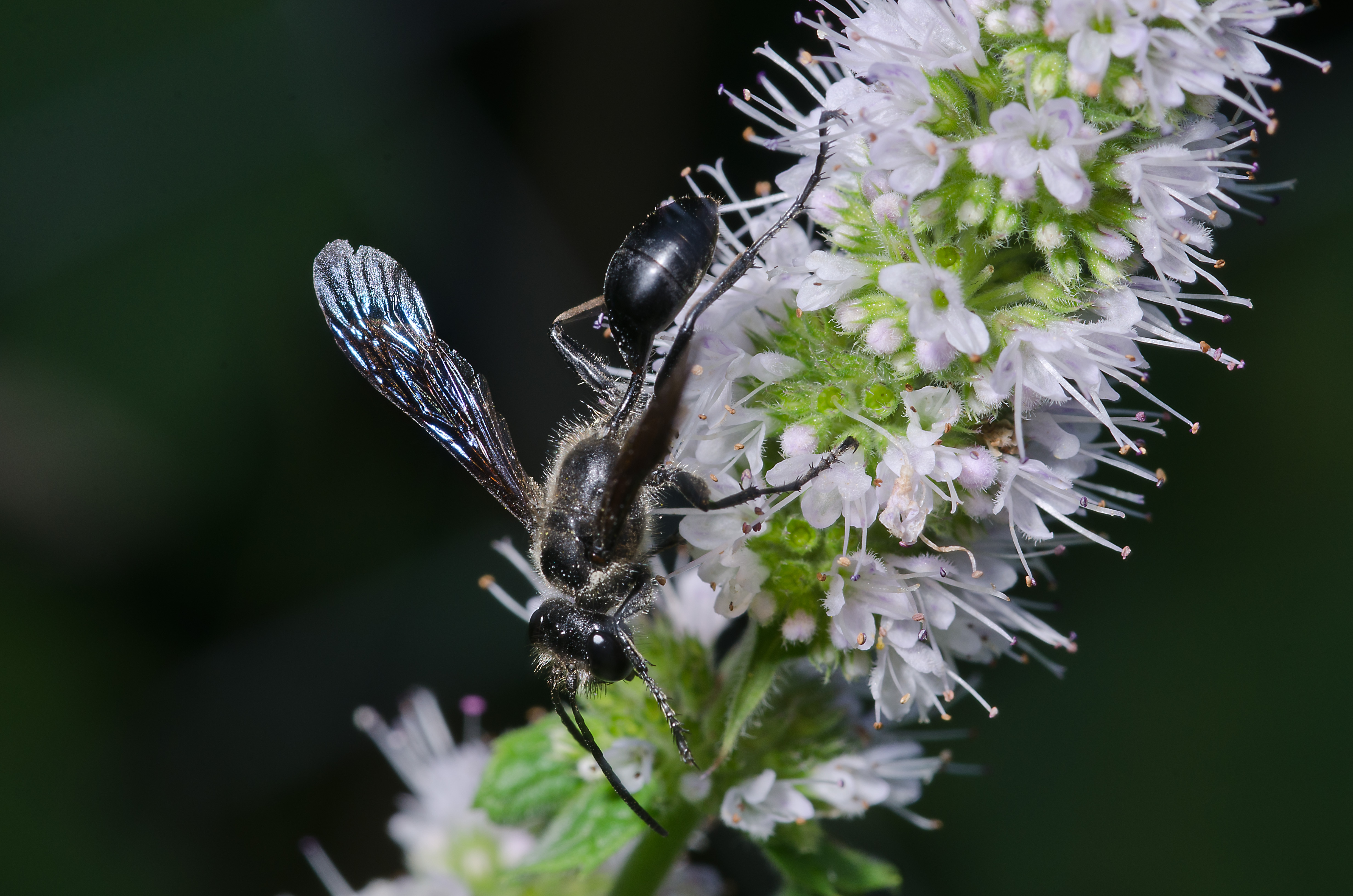 Stahlblauer Grillenjäger (Isodontia mexicana). Garten, Stuttgart